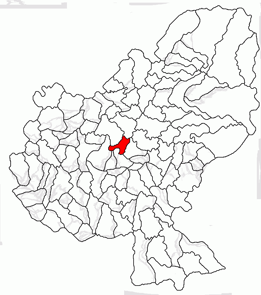 Categorie:Hărţi ale judeţului Mureş